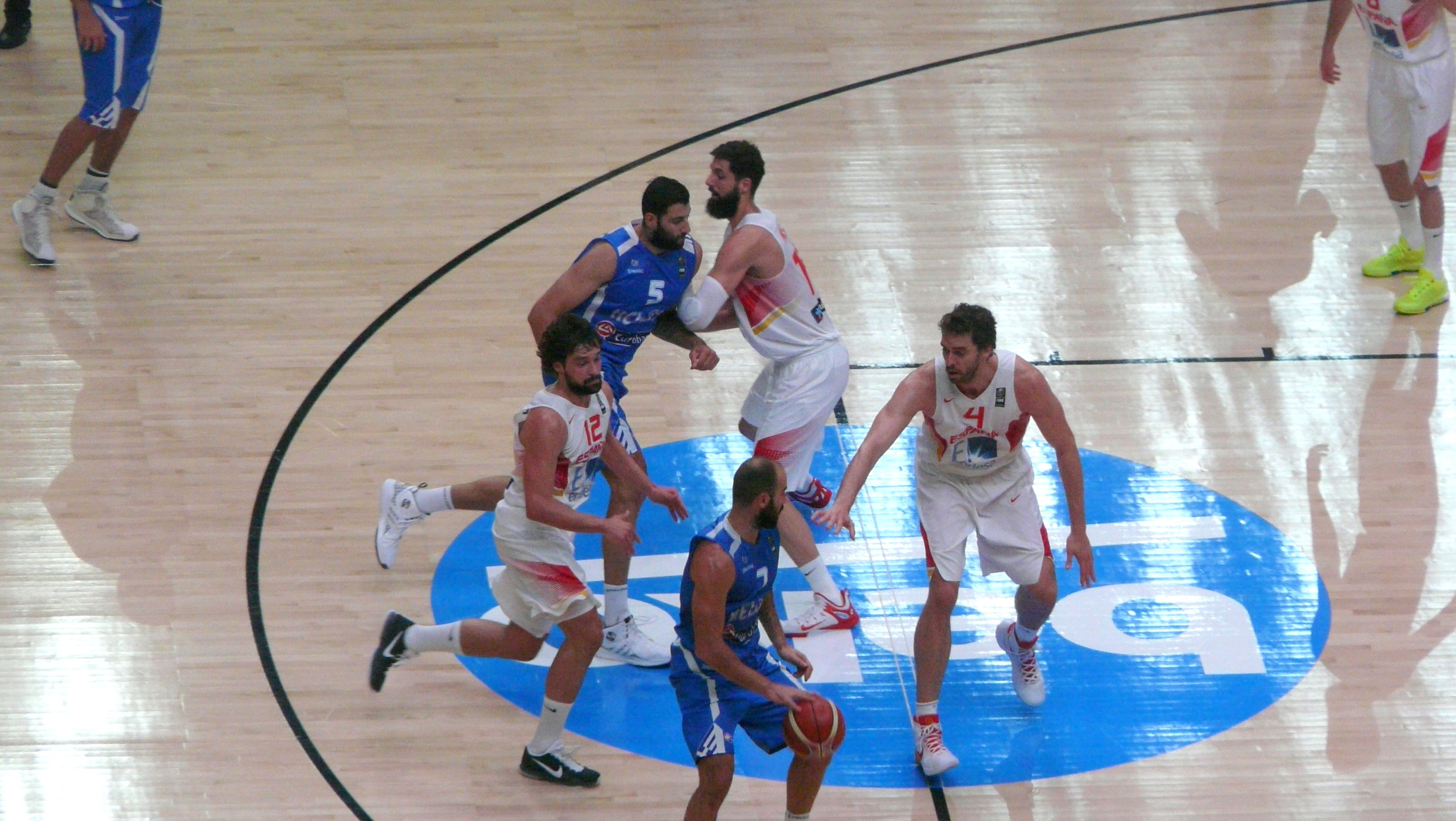 Vasílios Spanoúlis (#7) au cours du deuxième quart-temps du quart de finale de l'EuroBasket 2015 entre la Grèce et l'Espagne, le 15 septembre 2015.